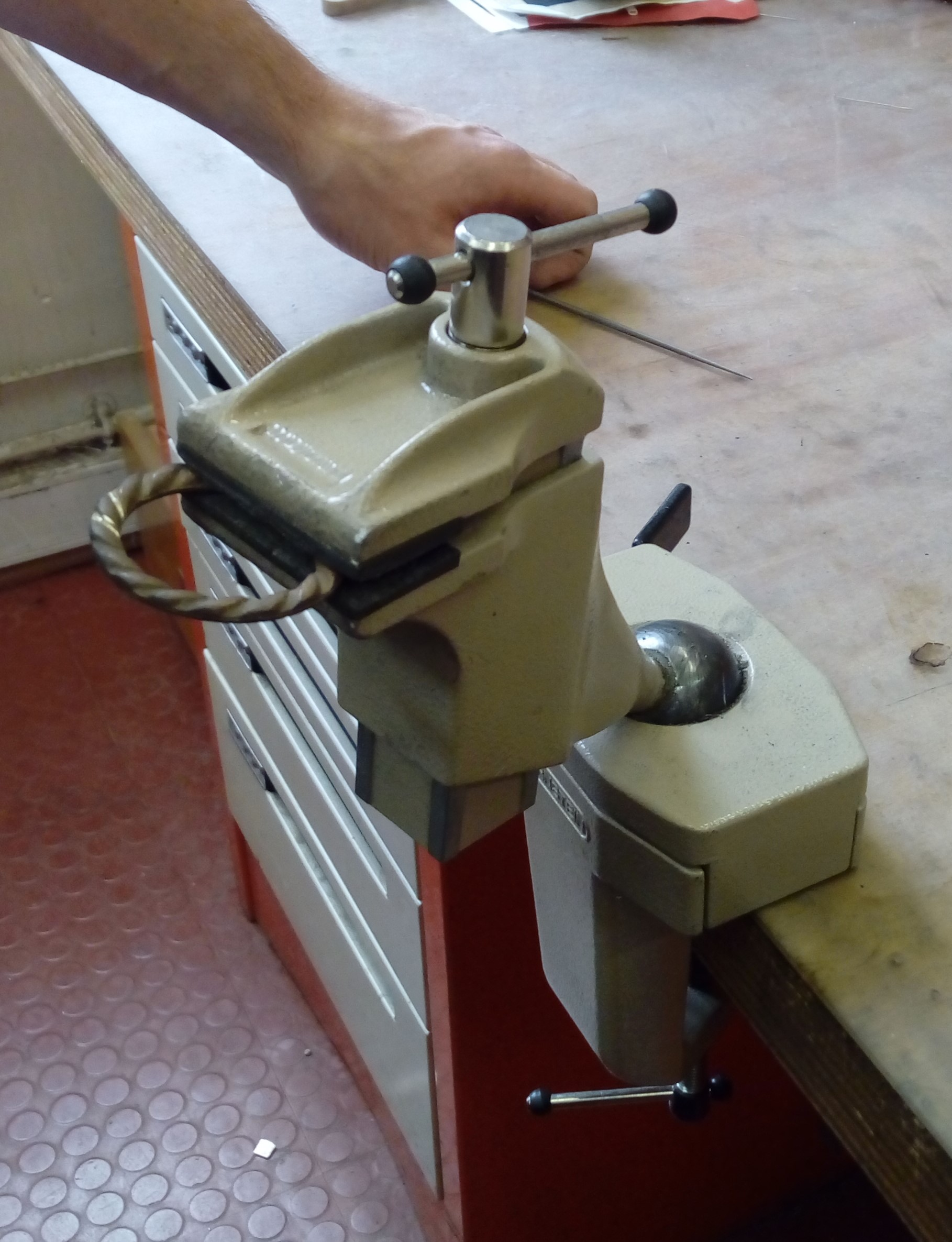 Etau de bijoutier ou étau à rotule